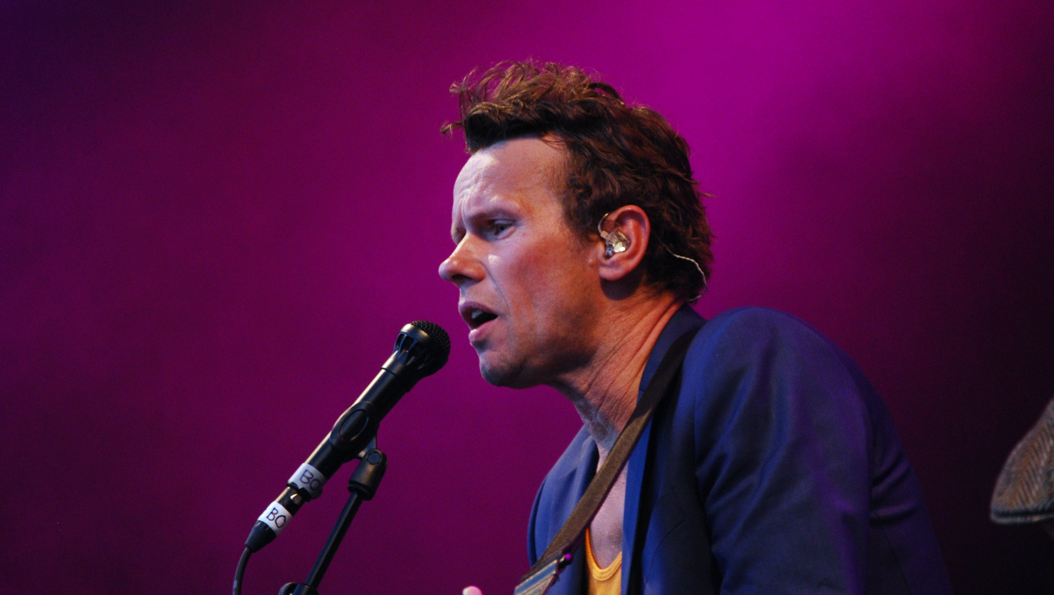 Bo Sundström fra Bo Kaspers Orkester under en konsert i Langesund i juli 2011.